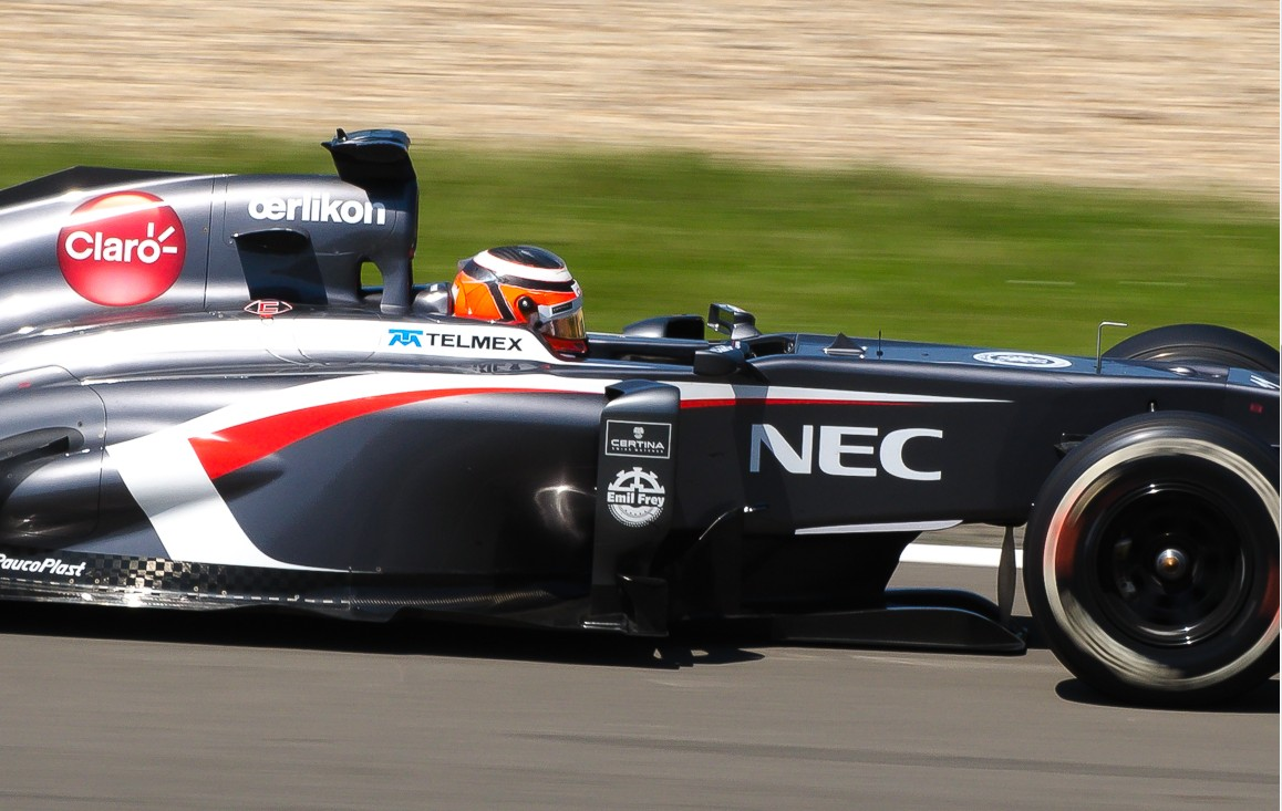 Nico Hülkenberg während dem Grossen Preis von Deutschland auf dem Nürburgring. Das Foto wurde zwischen ADVAN-Bogen und NGK-Schikane aufgenommen. Zum vollständigen Foto: Sauber F1 Nürburgring 2013 Nico Hülkenberg